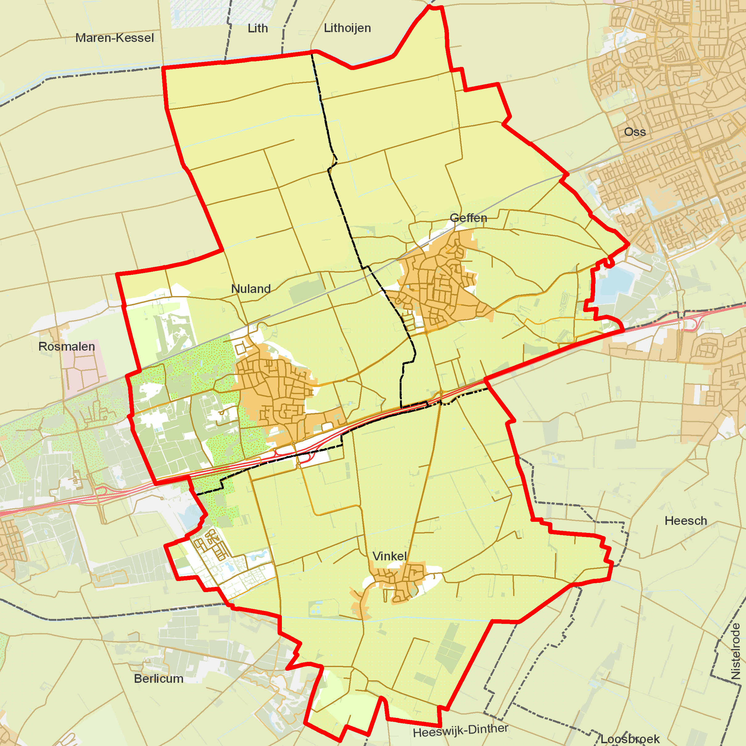 BAG woonplaatsen - Gemeente Maasdonk.png